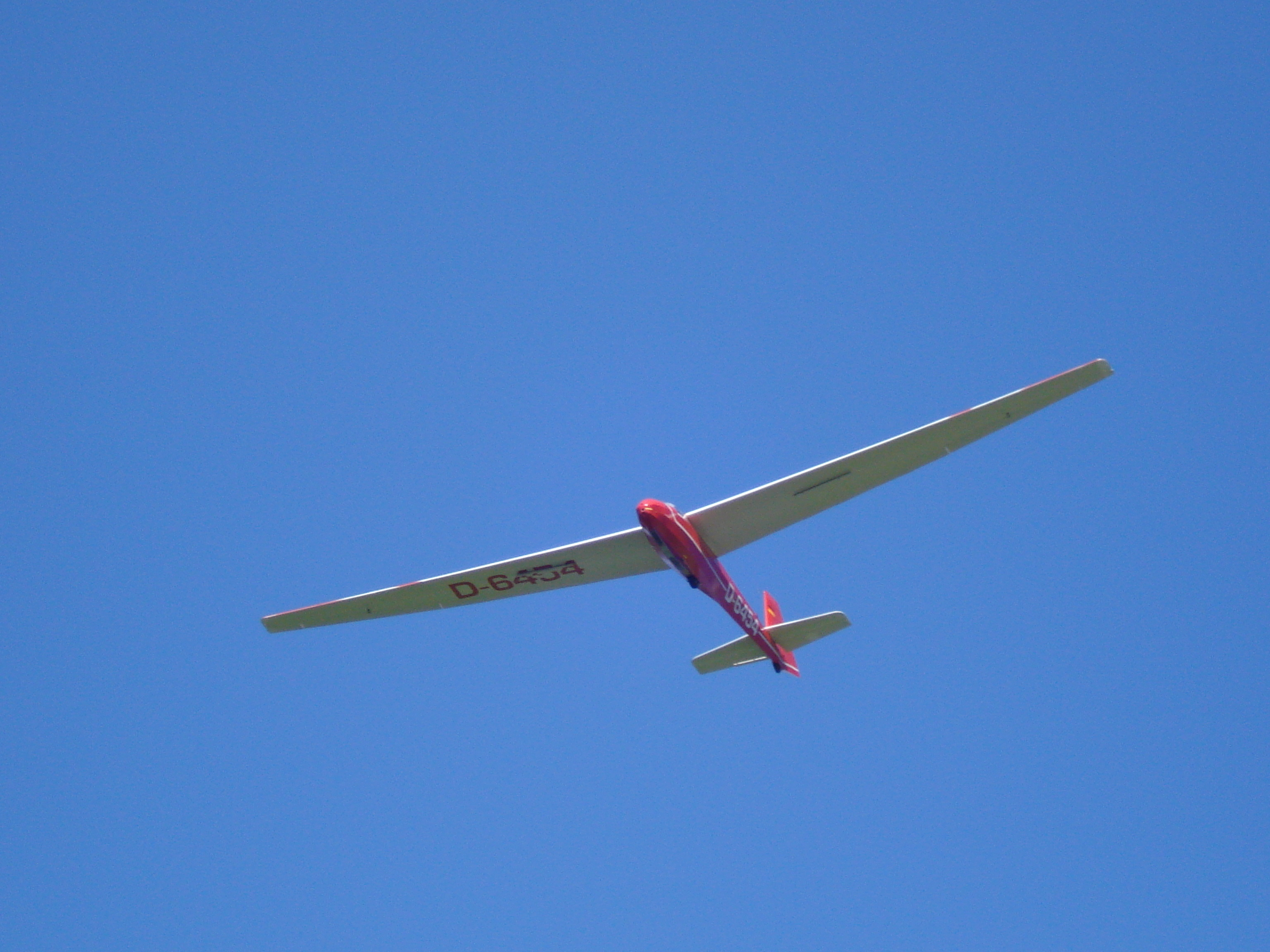 Ka8 der Luftsportvereinigung Göttingen